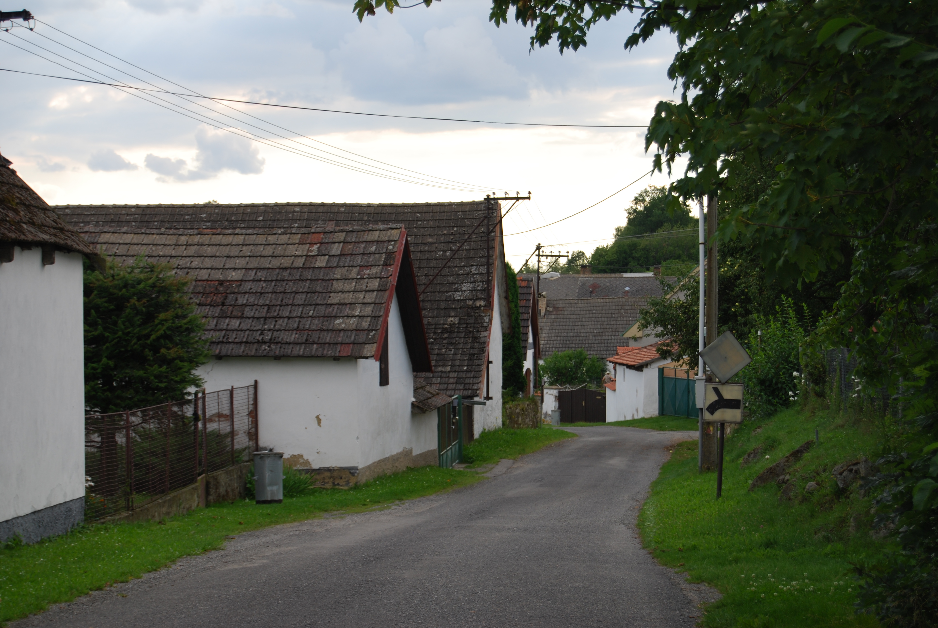 Pohled na část obce. Brtec je část obce Nadějkov v okrese Tábor. Česká republika.